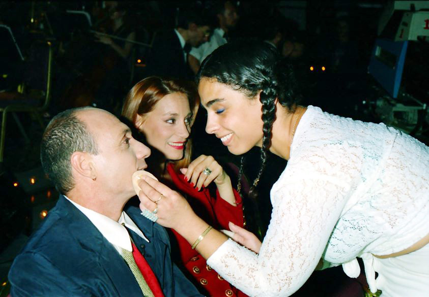 אלדד זיו ומיקי קם מתאפרים לקראת שידור